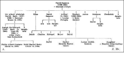 Family tree of the [Anglo-Indian] Sassoon family, originally from Baghdad. From the 1901-1906 Jewish Encyclopedia, now in the public domain